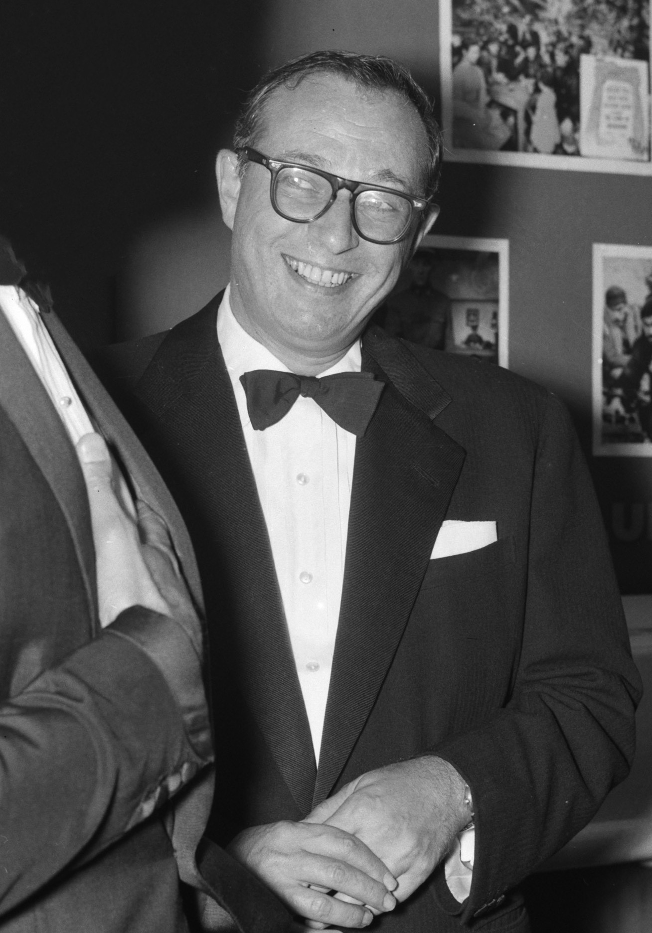 Prins Bernhard woont galavoorstelling van de film "The Guns of Navarone" bij. Carl Foreman